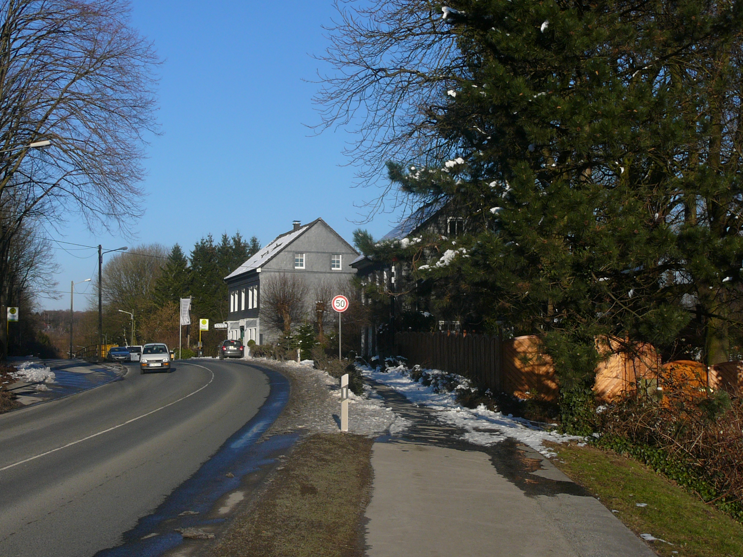 Düsseldorfer Straße, Wuppertal